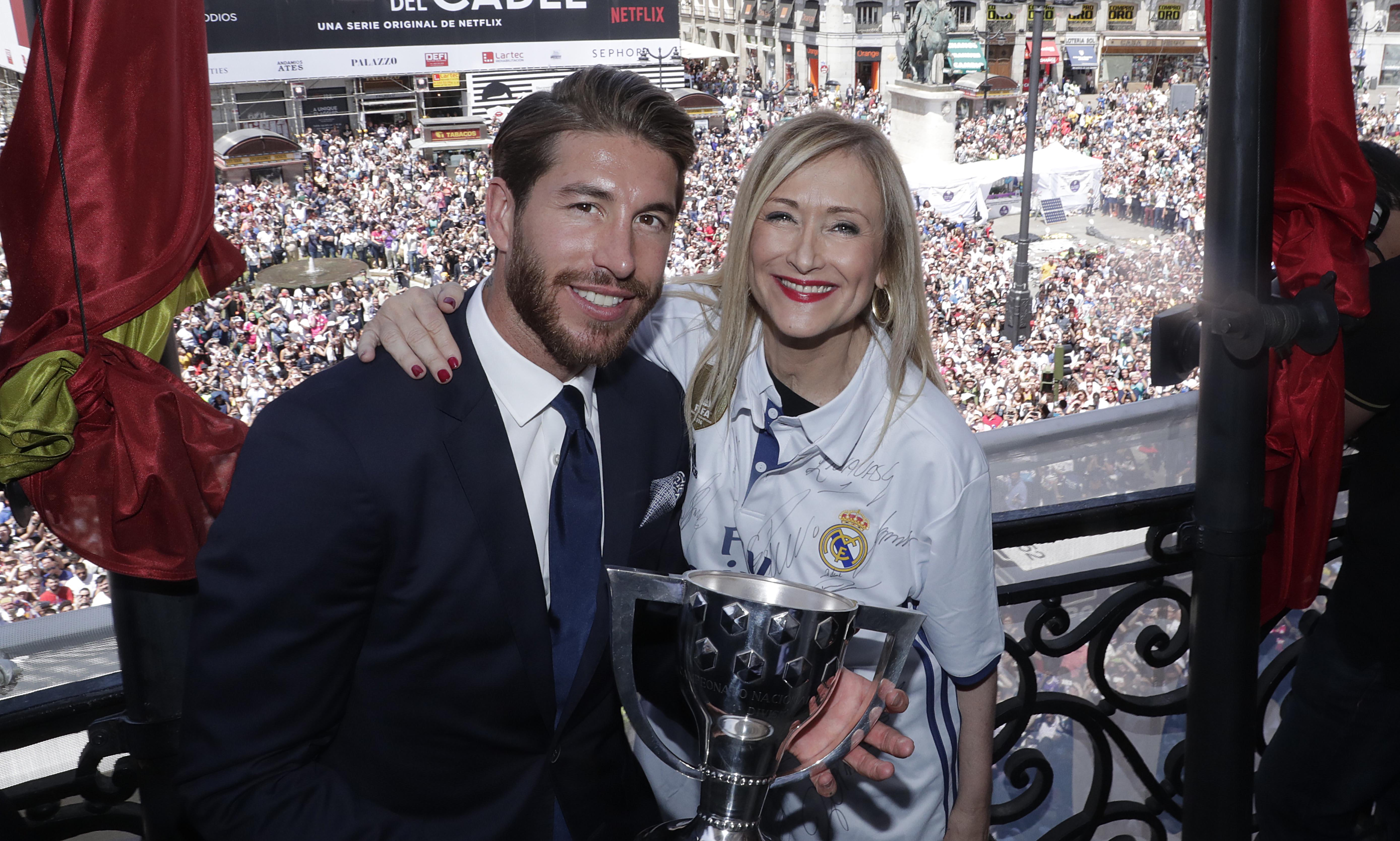 Hoy he recibido, en la Real casa de Correos, a los campeones nuevos campeones del liga, El Real Madrid, un equipo universal que está paseando por todo el mundo el nombre de Madrid y de España. Esta liga es un premio a la constancia, al buen juego, que en definitiva es sinónimo de jugar bien permanentemente, para un equipo que juega con sacrificio, compañerismo, respeto al rival y solidaridad, un equipo reconocido en todo el mundo por sus éxitos y también por los principios deportivos con los que juega. ¡Hala Madrid!